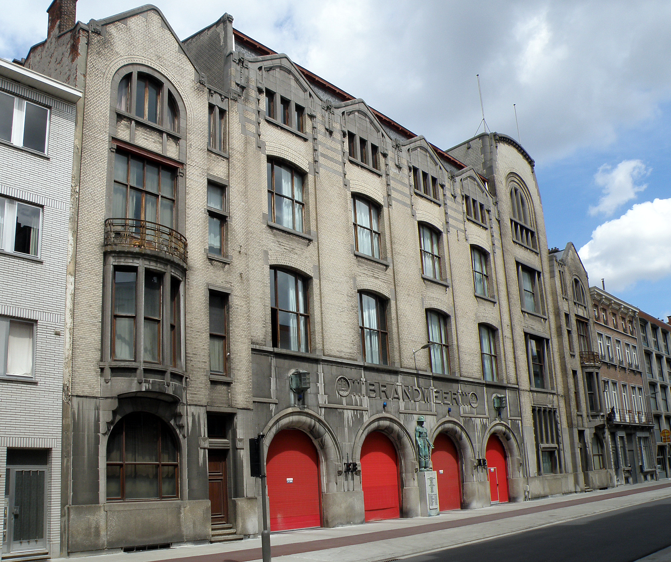 Antwerpen, België. Brandweerkazerne Paleisstraat, gevel aan de Paleisstraat. Ontwerp van archit. Emiel Van Averbeke en Jan van Asperen, anno 1907.